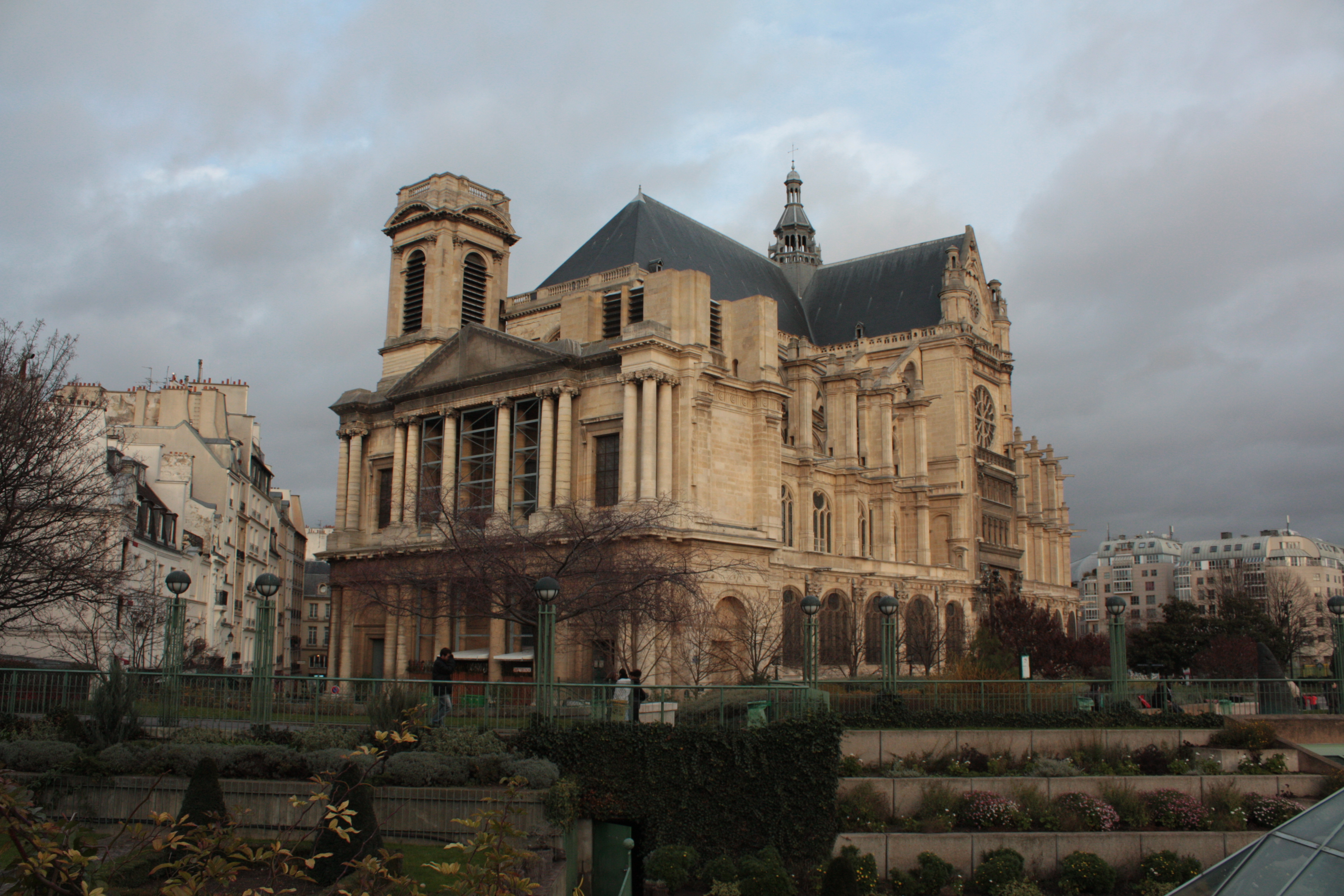 L'église Saint-Eustache, 1er arrondissement de Paris